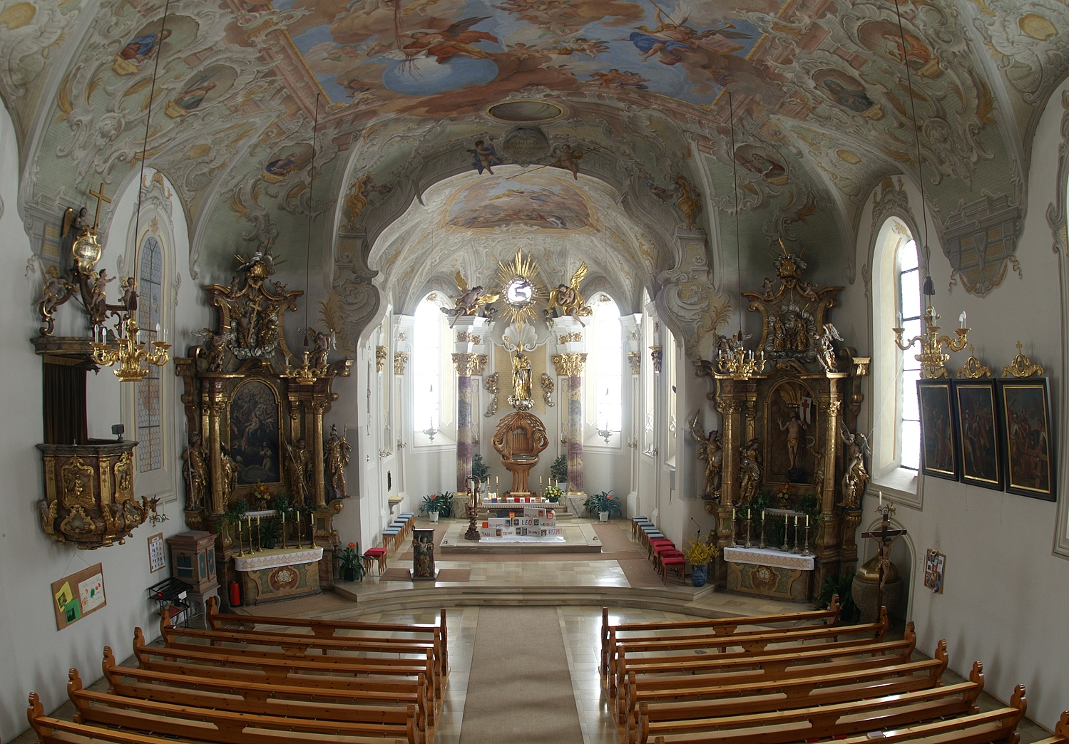 Kath. Pfarrkirche hl. Nikolaus. Innenansicht